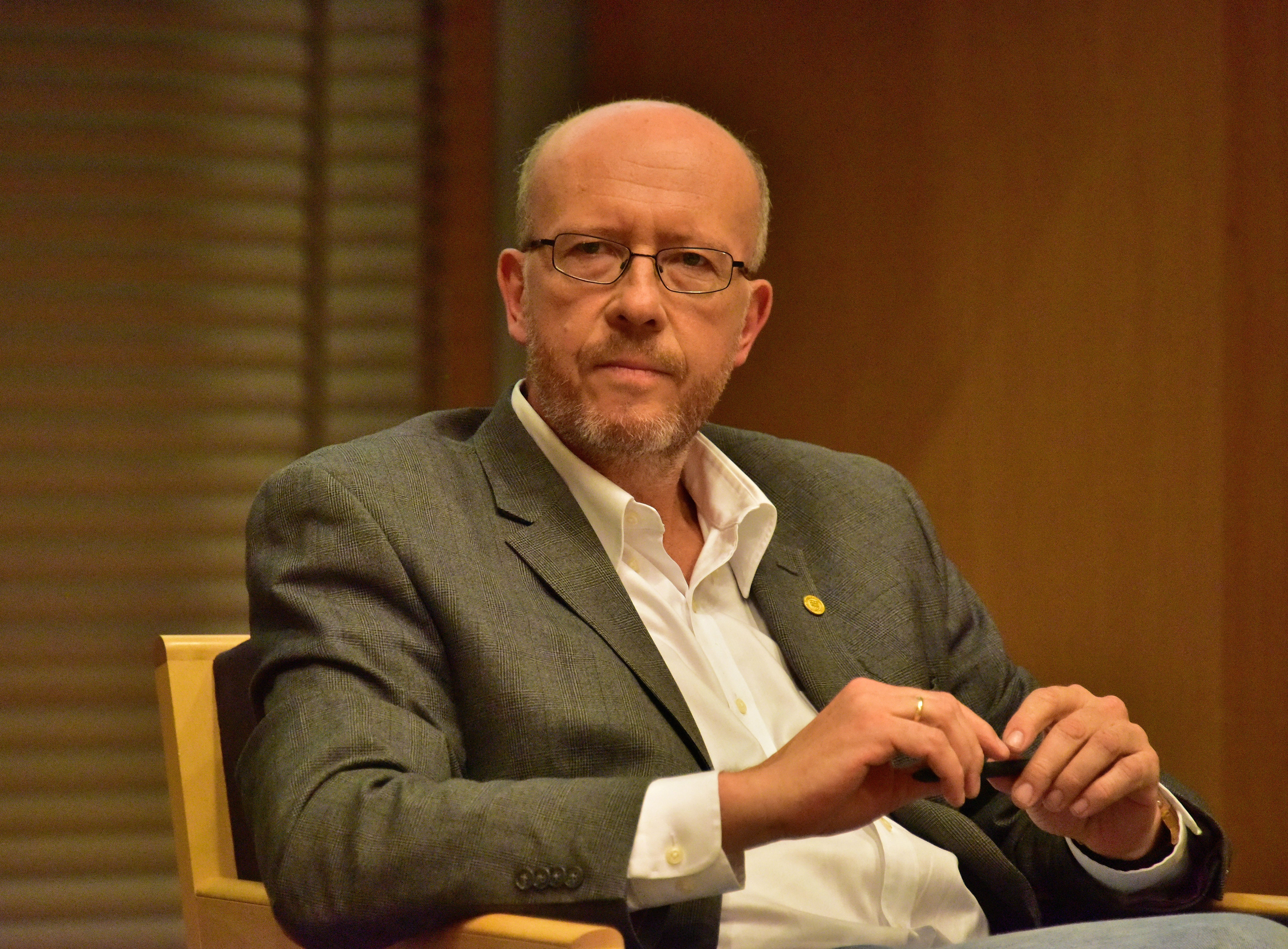 Prof. Jan Grabowski, University of Ottawa